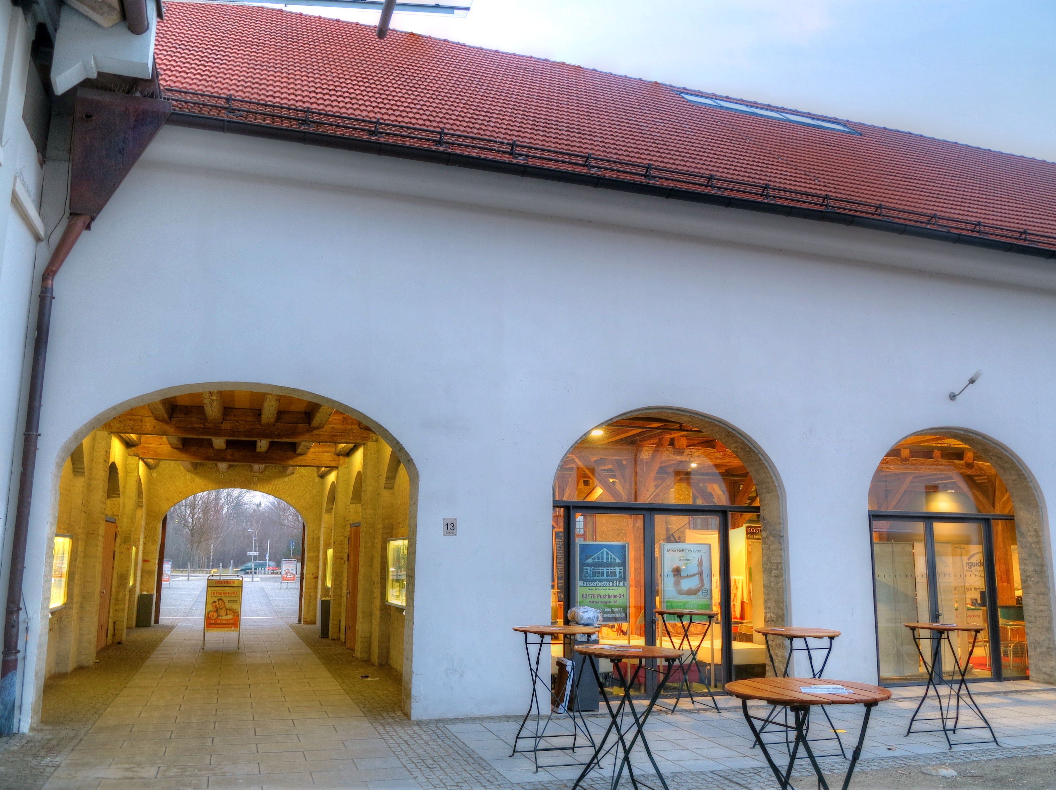 Fürstenfeldbruck, Veranstaltungsforum Fürstenfeld